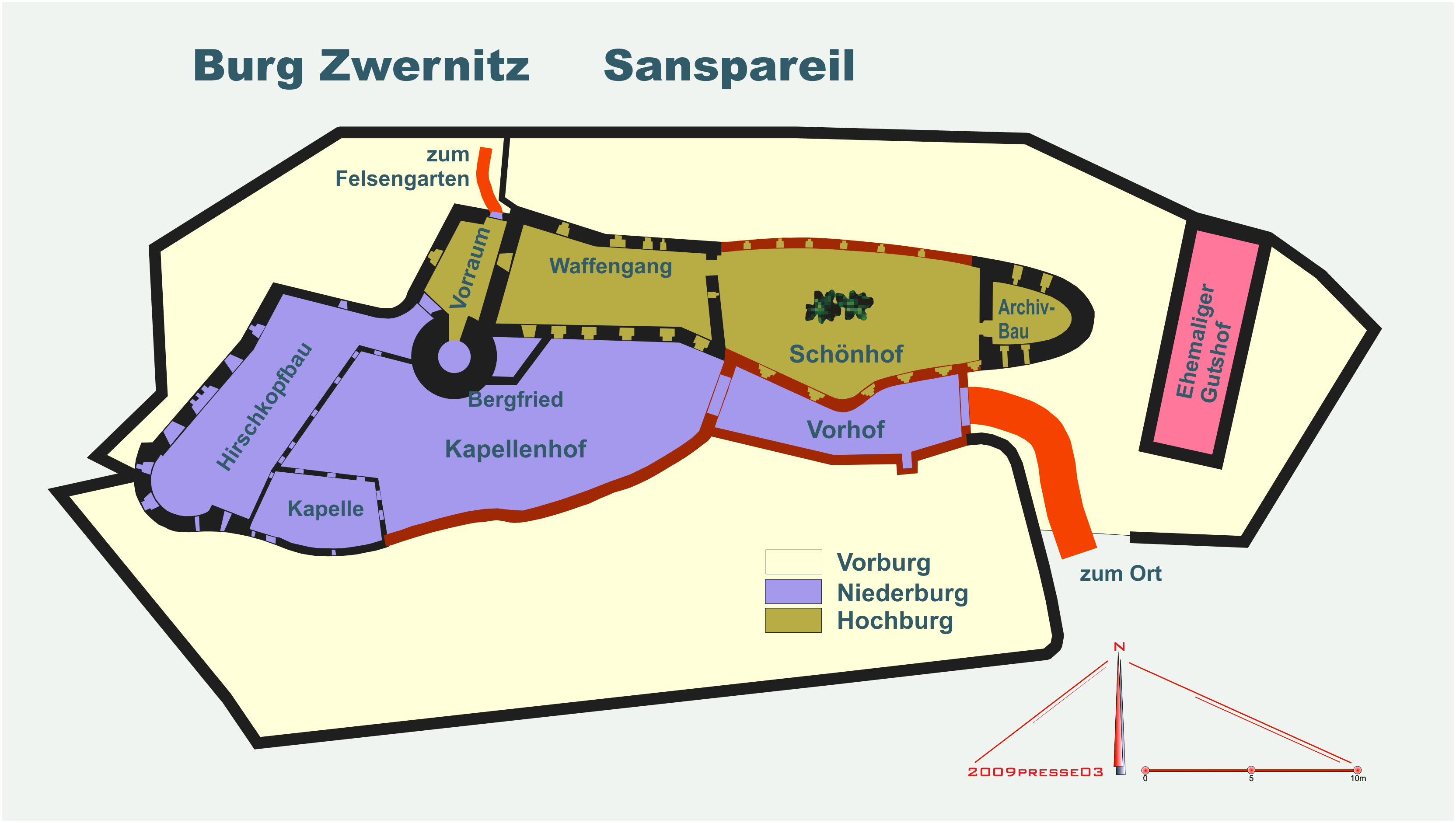 Grundriss der Burg Zwernitz in Sanspareil, Gemeinde Wonsees, Fränkische Schweiz, Bayern.